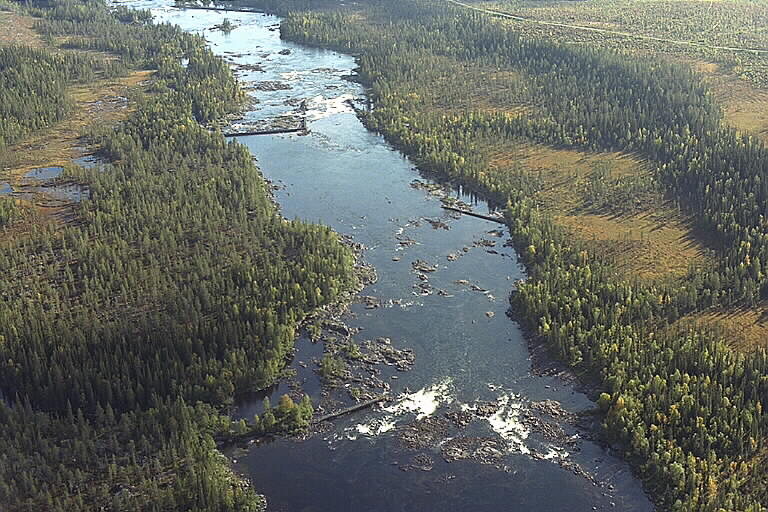 Laisälven Motiv: Hällforsen Nyckelord: Flygbilder, Riksintressen Kategori: Insjömiljöer Laisälven.